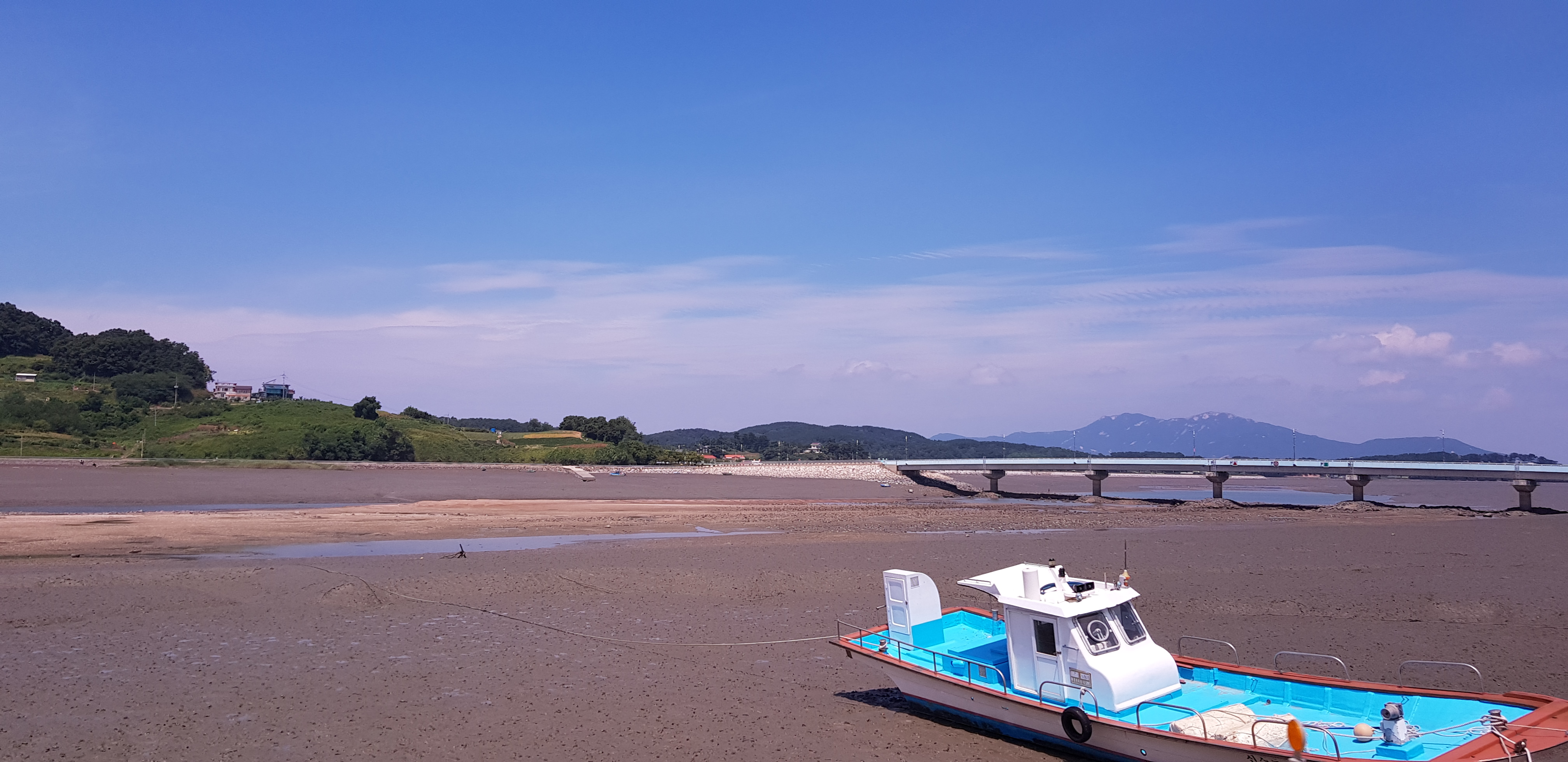 푸른하늘과 배와 숲이 어울어진 시도 오른쪽은 강화도이다.